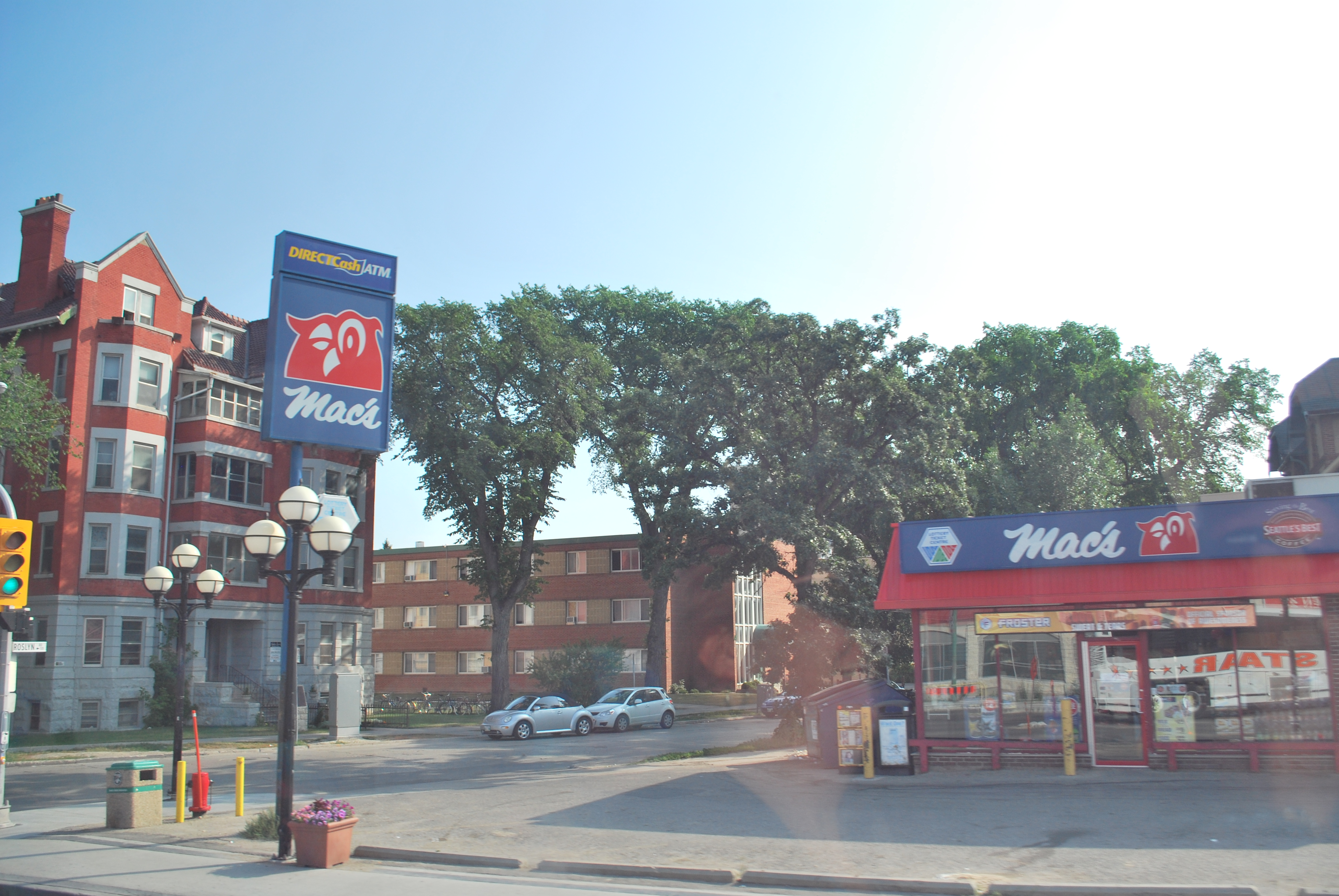 Succursale de Mac's à Winnipeg, au Manitoba (Canada).